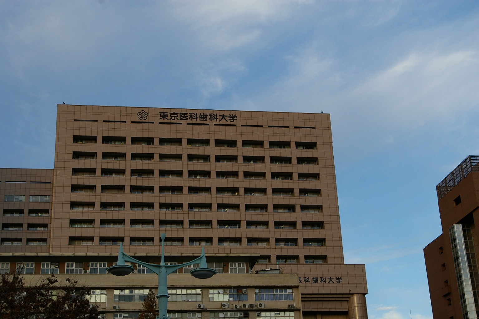 GFDL2009